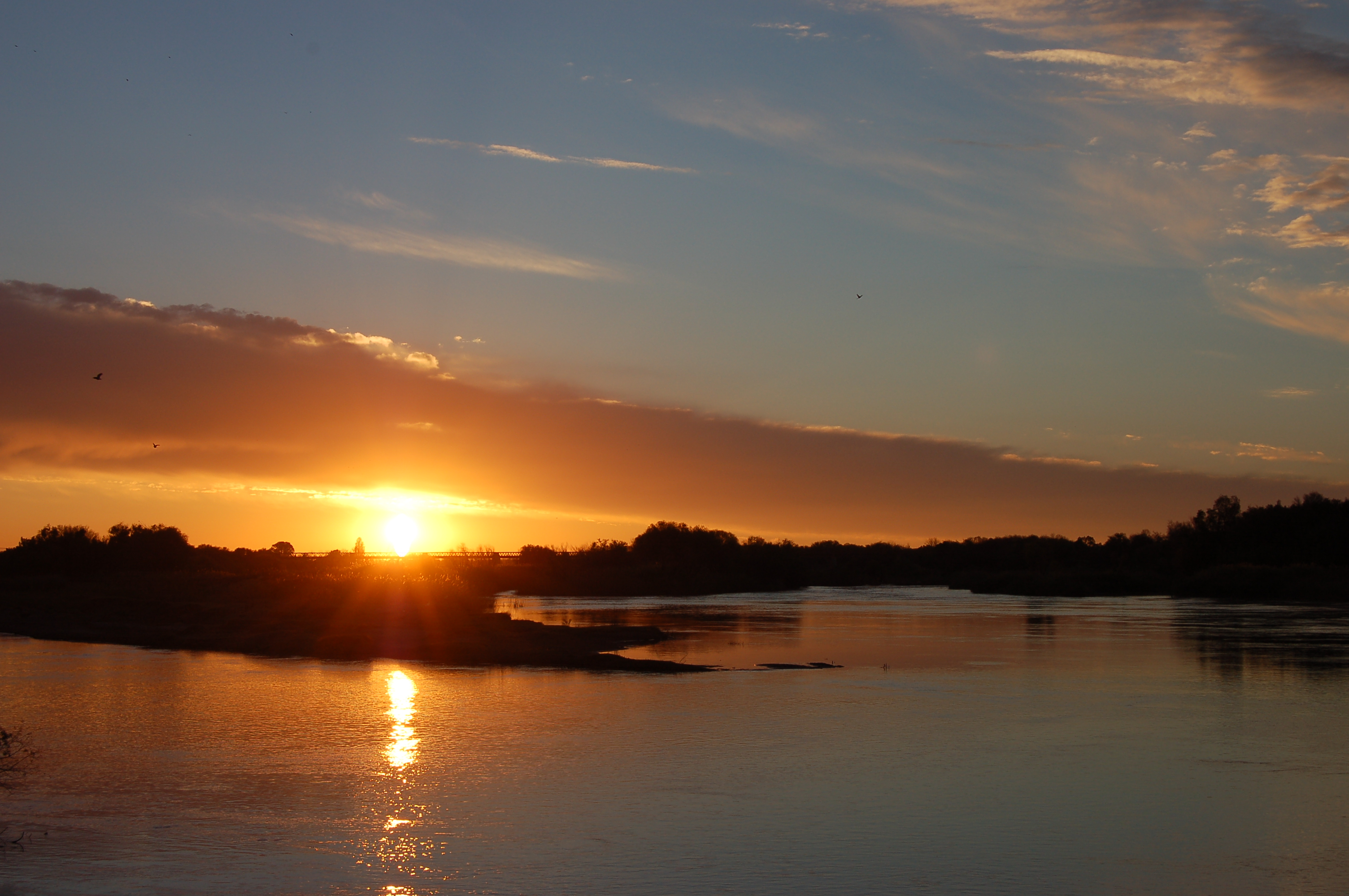 Zalazak sunca iznad rijeke.